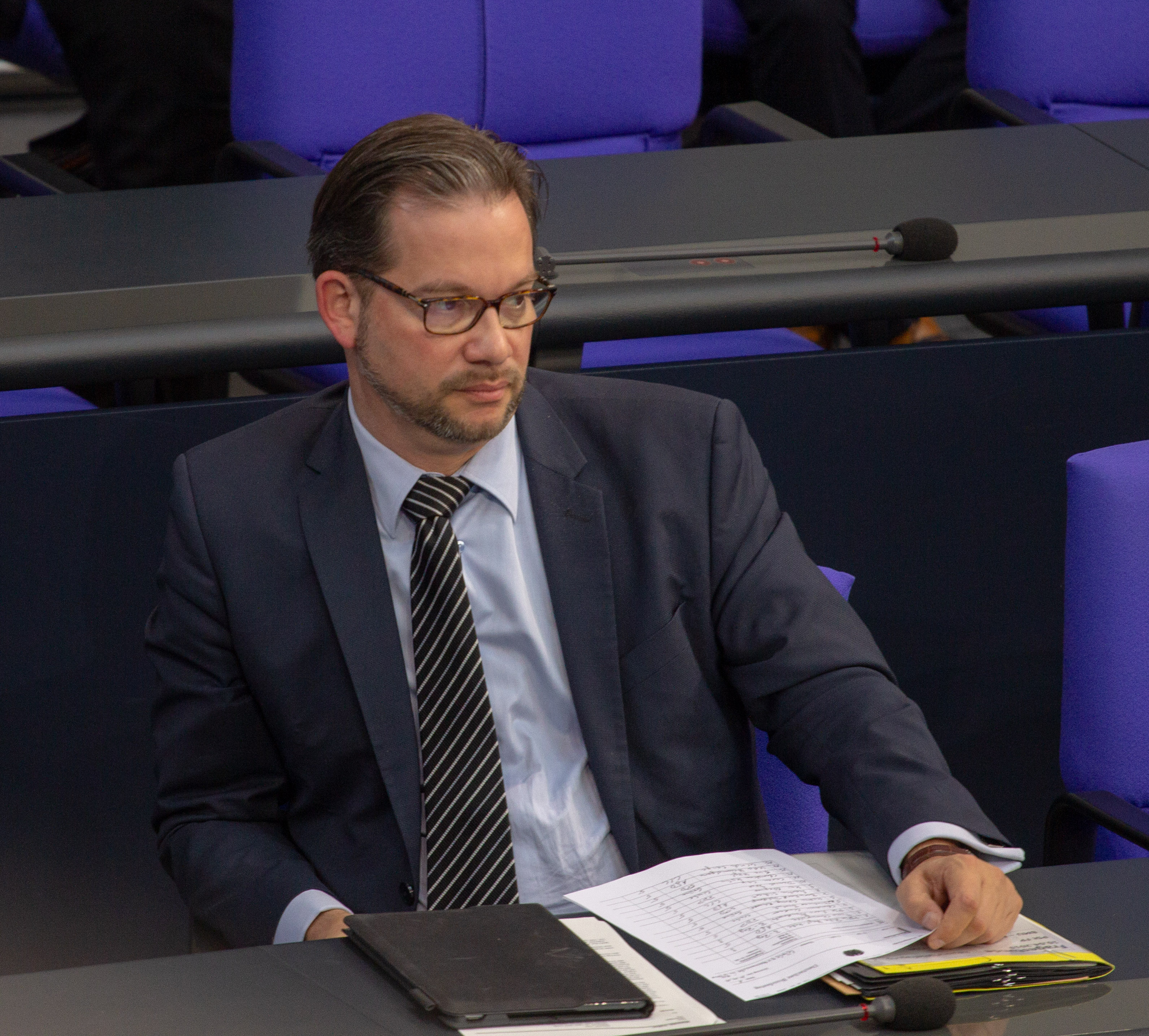 Florian Pronold, Mitglied des Deutschen Bundestages, während einer Plenarsitzung am 10. April 2019 in Berlin.